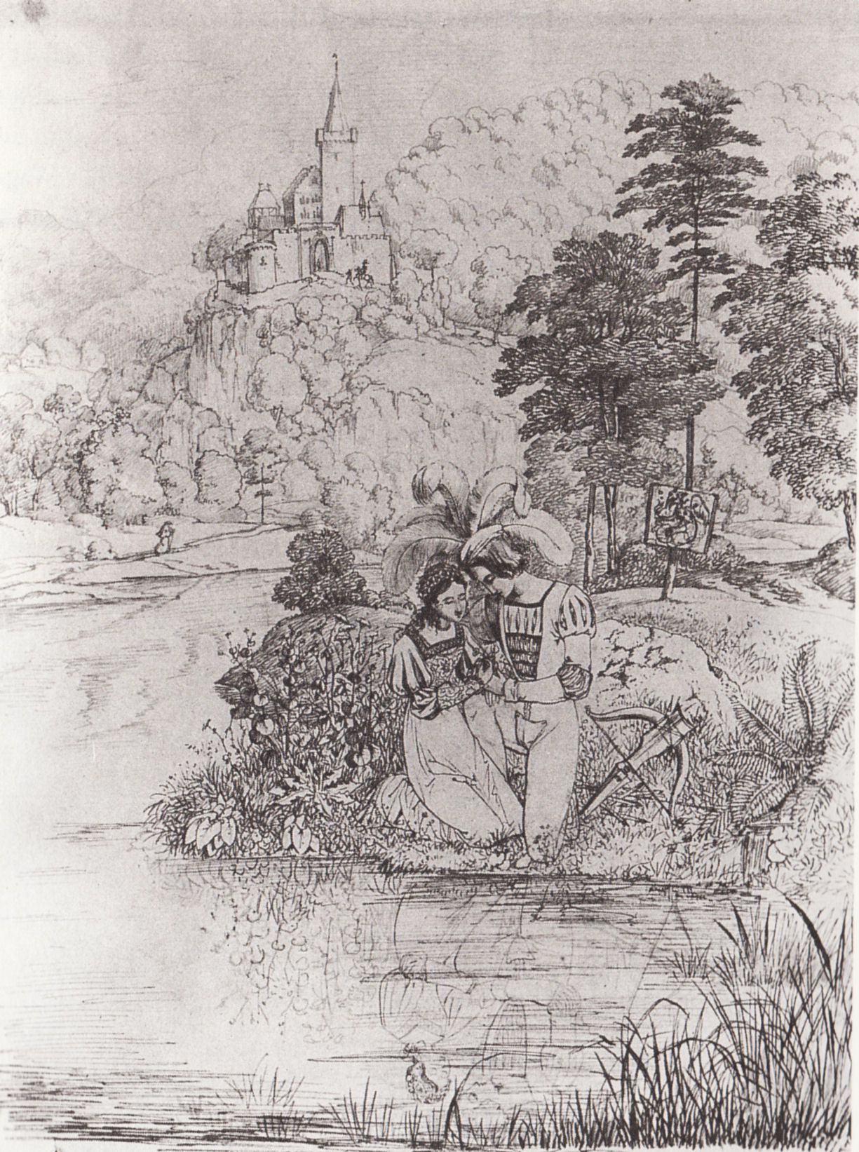 Illustration zu "Der Zauberring" von Friedrich de la Motte Fouqué